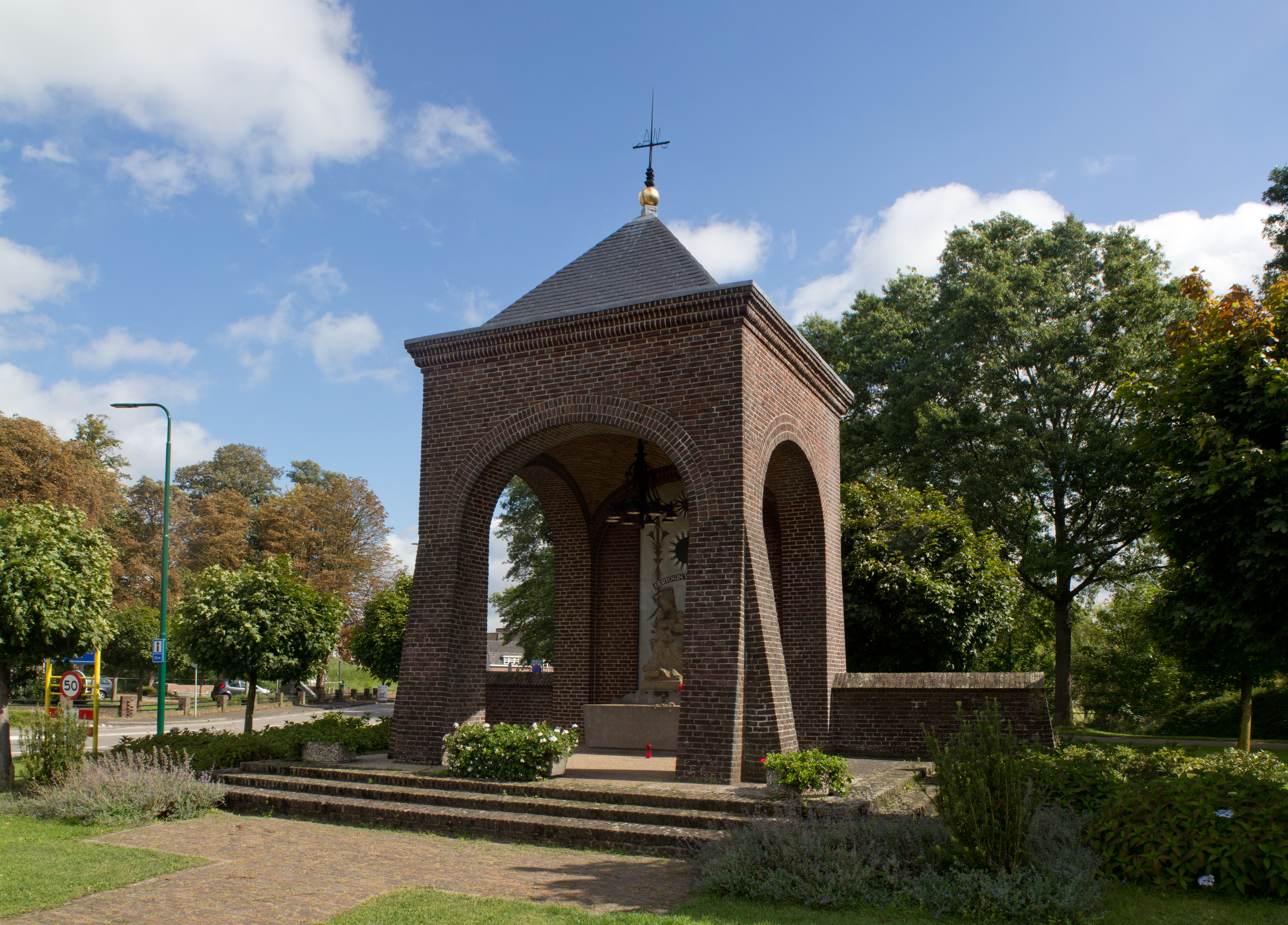 Grave, Mariakapel in Traditionalisme stijl.